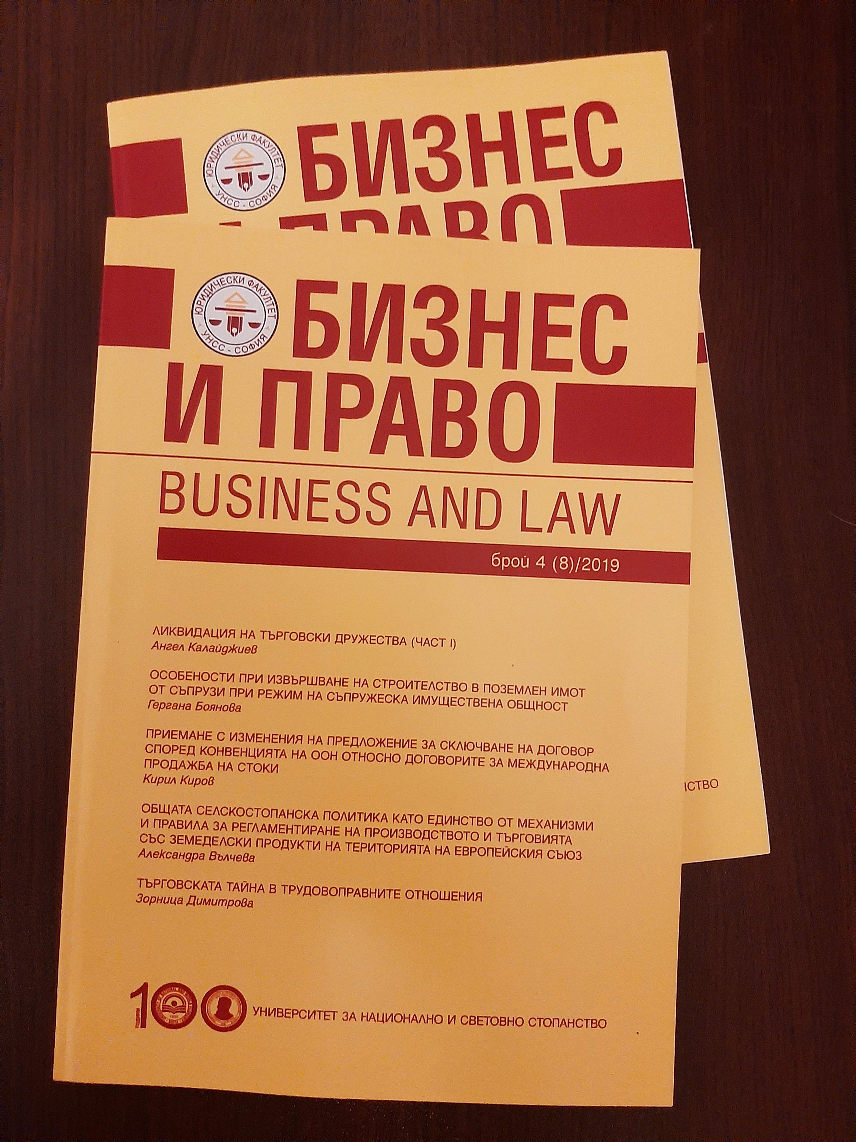 сп. Бизнес и право